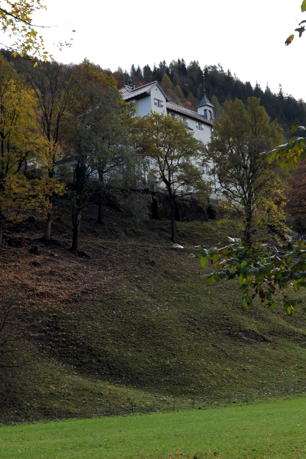 Schloss Gartenau und Kalkofen The making of this work was supported by Wikimedia Austria. For other files made with the support of Wikimedia Austria, please see the category Supported by Wikimedia Österreich.